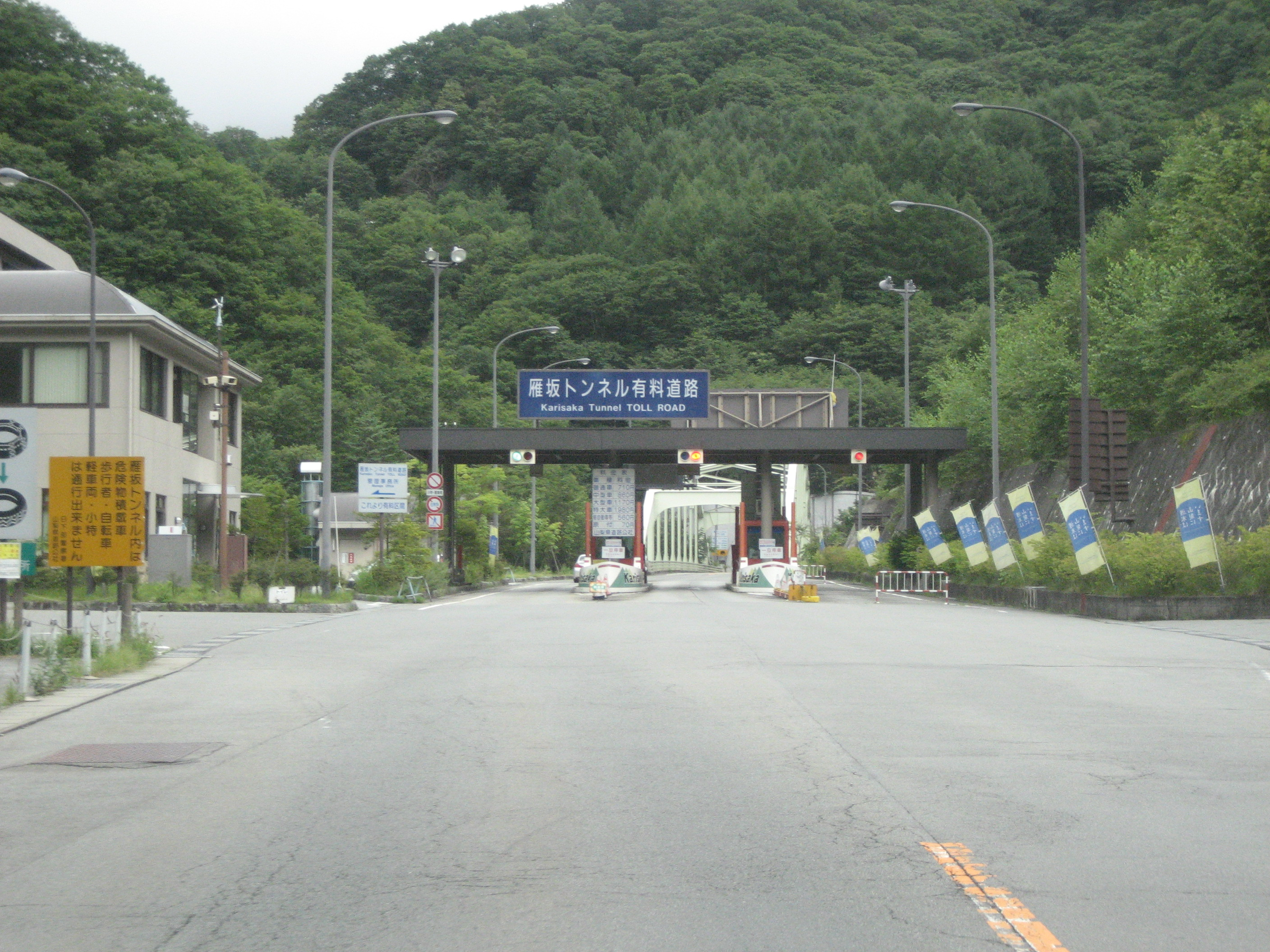 雁坂トンネル有料道路料金所